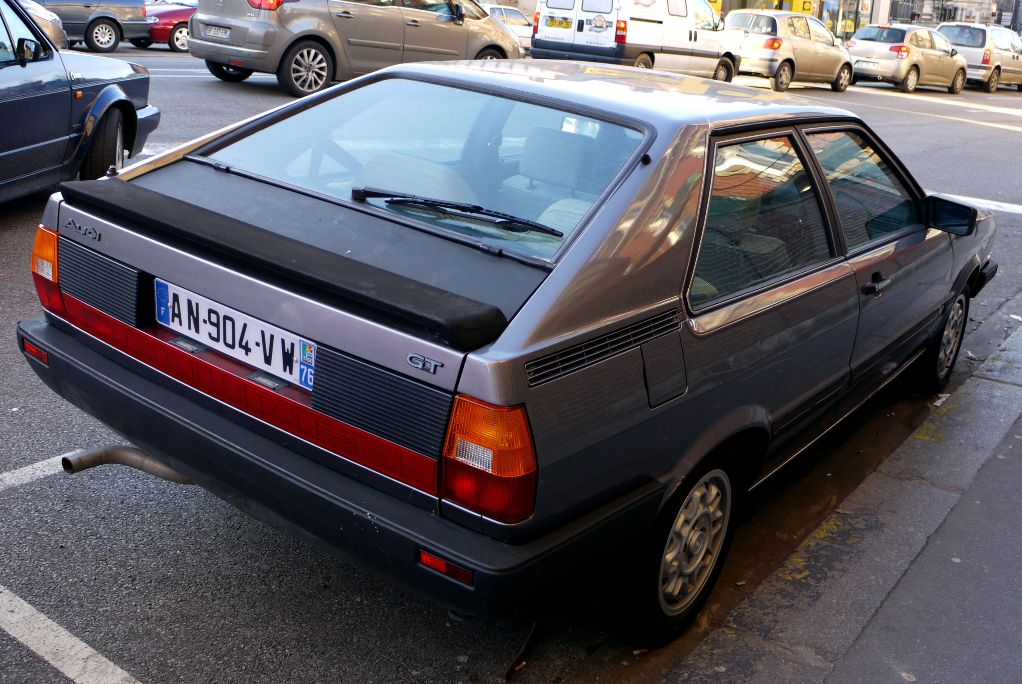 Audi Coupé GT 5E Mk I.